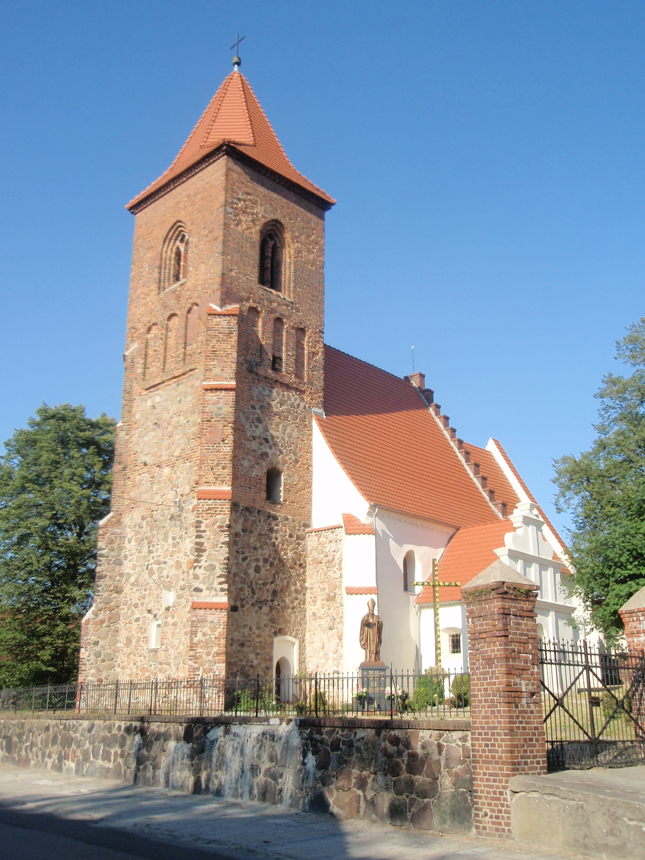 Kościół pw. św. Barbary w Gaworzycach (zabytek nr rejestr. A/1542/161)